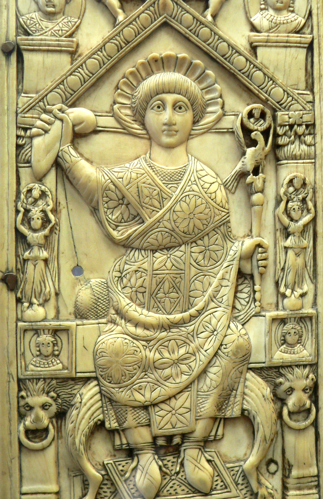 Diptyque de Flavius Anastasius Probus Diptyque, feuillet droit, détail. Consul en 517, Constantinople, Ivoire d'éléphant, Ancien trésor de Saint-Etienne de Bourges.